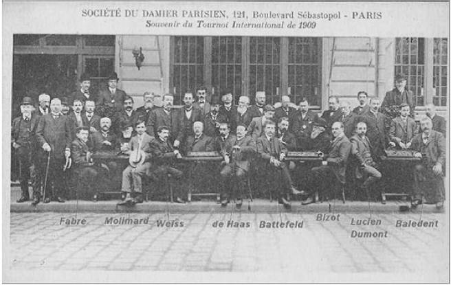 Фотография участников шашечного турнира 1909 года в Париже